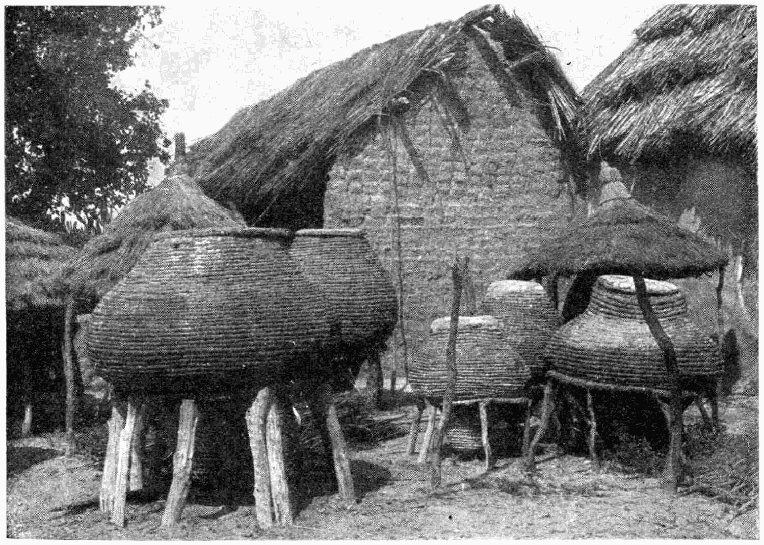 réservoirs a blé chez les ovambo (afrique sud-occidentale)